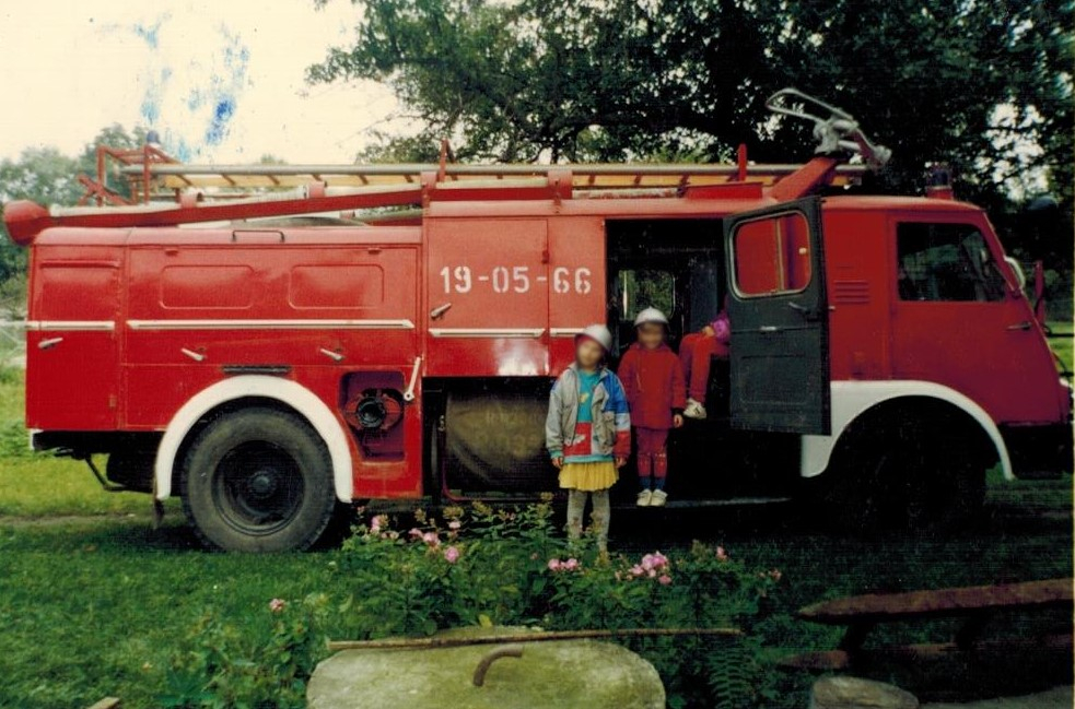 Samochód pożarniczy GBAM STAR A26P należący do OSP Pisarowce- lata 90 XX wieku.